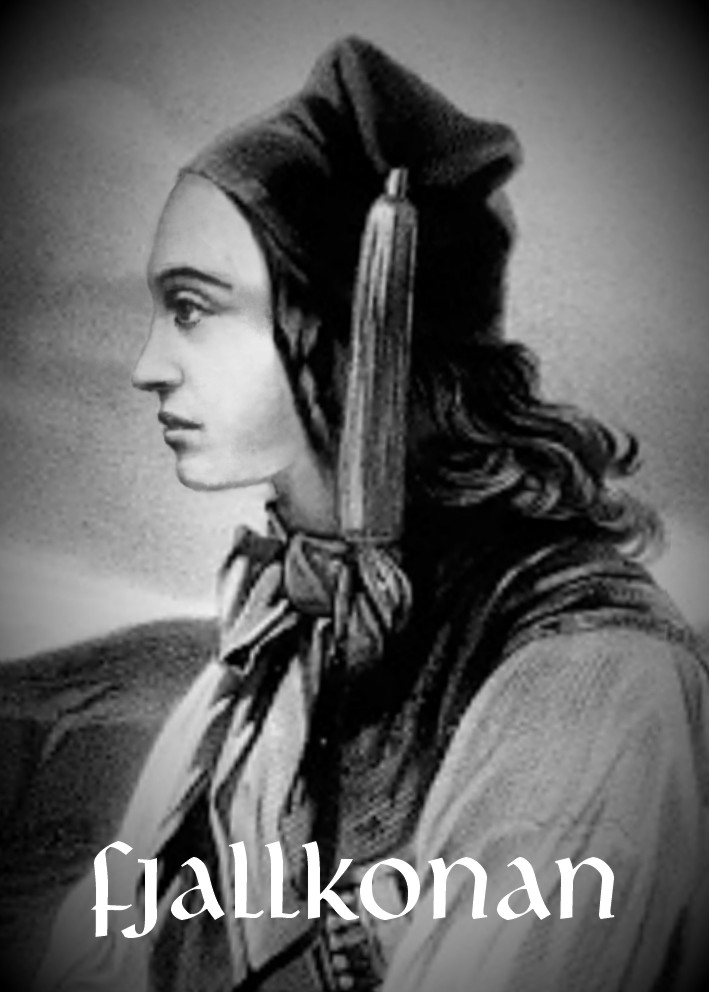 Fjallkona, drawing I made by myself.